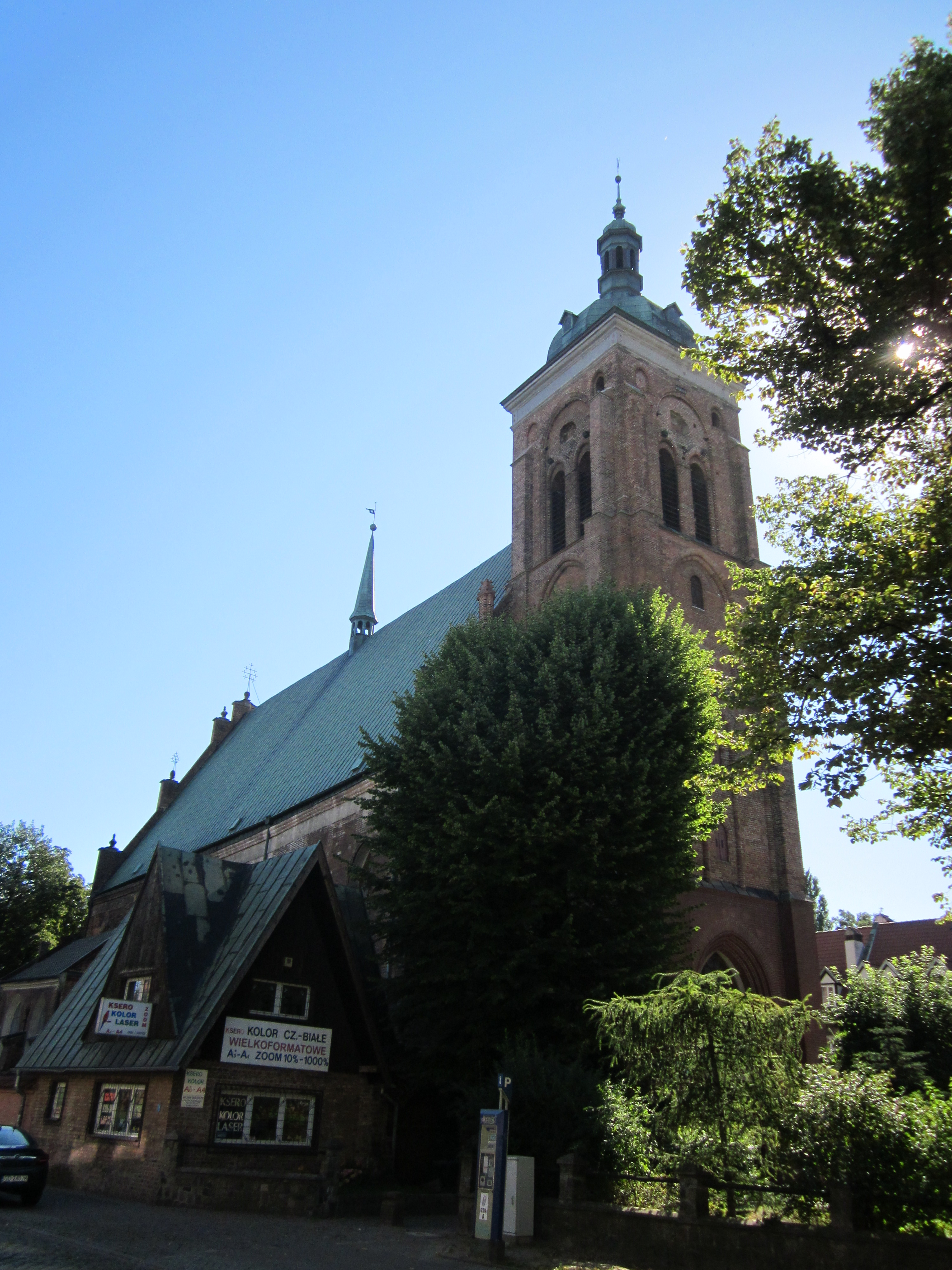 Gdańsk Stare Miasto, ul. Zaułek św. Bartłomieja 1 - Konkatedra greckokatolicka św. Bartłomieja i Opieki Najświętszej Bogurodzicy, 1486-1494, po 1945